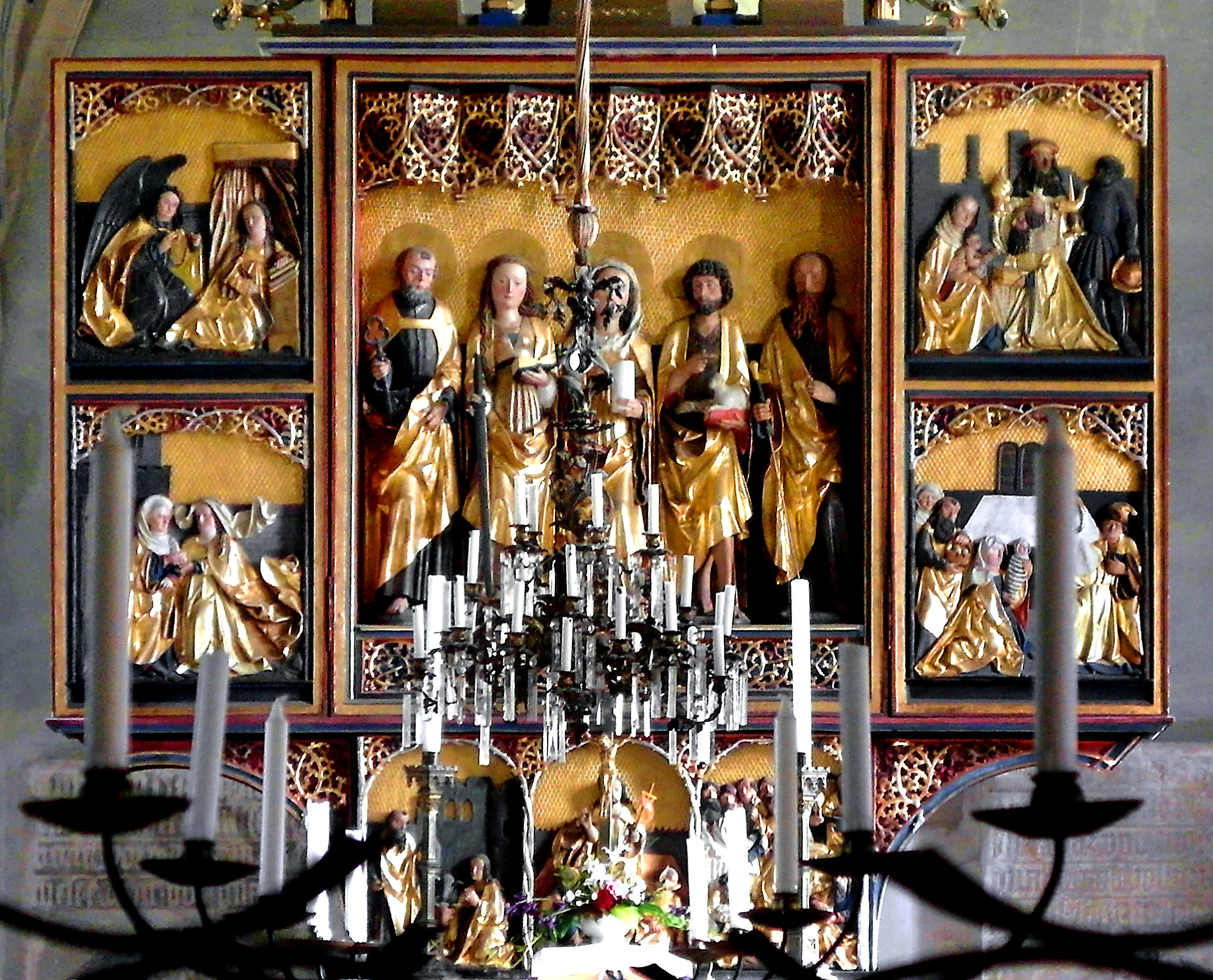 01.07.2014 01774 Höckendorf (Klingenberg): Dorfkirche, Kirchweg 1 (GMP: 50.926062,13.587406). Romanische Kirche in Höckendorf, um 1325 erbaut auf den Grundmauern der ehemaligen Burg bzw. des Rittergutes der Ritter von Theler) am Heiligen Weg. Hier der Blick aus dem Westvorraum zum spätgotischen Flügelaltar von 1515. [SAM4935.JPG]20140701120DR.JPG(c)Blobelt